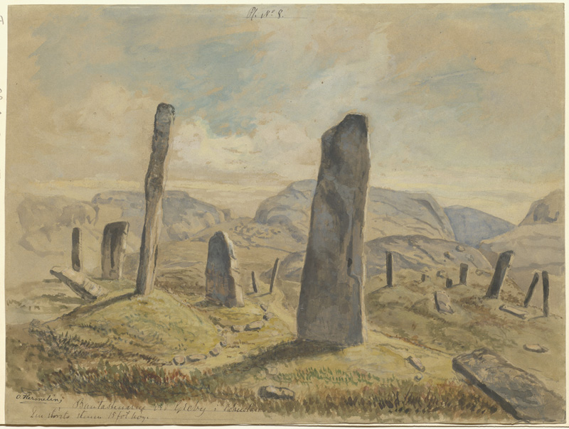 Gravfält bestående av högar, långhögar, stensättningar och resta stenar. Tanum 734:1. Akvarell av Olof Hermelin, troligen från 1880-talet. Motiv: Tanum 734:1 Kategori: Akvarell, Grav markerad av rest sten/block Gravfält bestående av högar, långhögar, stensättningar och resta stenar. Tanum 734:1. Akvarell av Olof Hermelin, troligen från 1880-talet. Tanum 734:1.